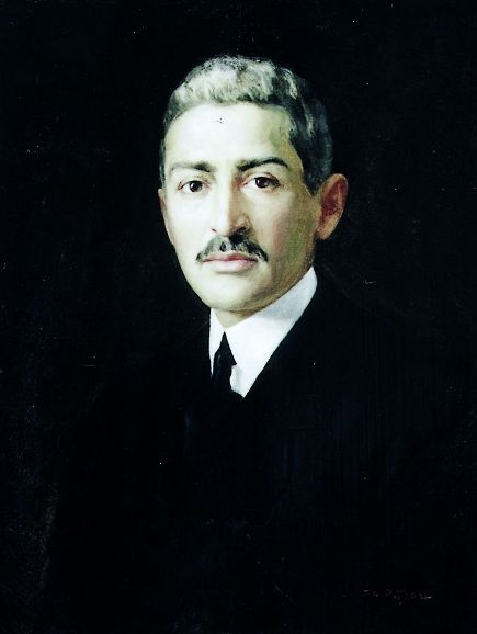 "Ίων Δραγούμης". Γ. Ν. Ροϊλός. Λάδι σε καμβά, Εθνικό Ιστορικό Μουσείο, αρ.κατ. 6206